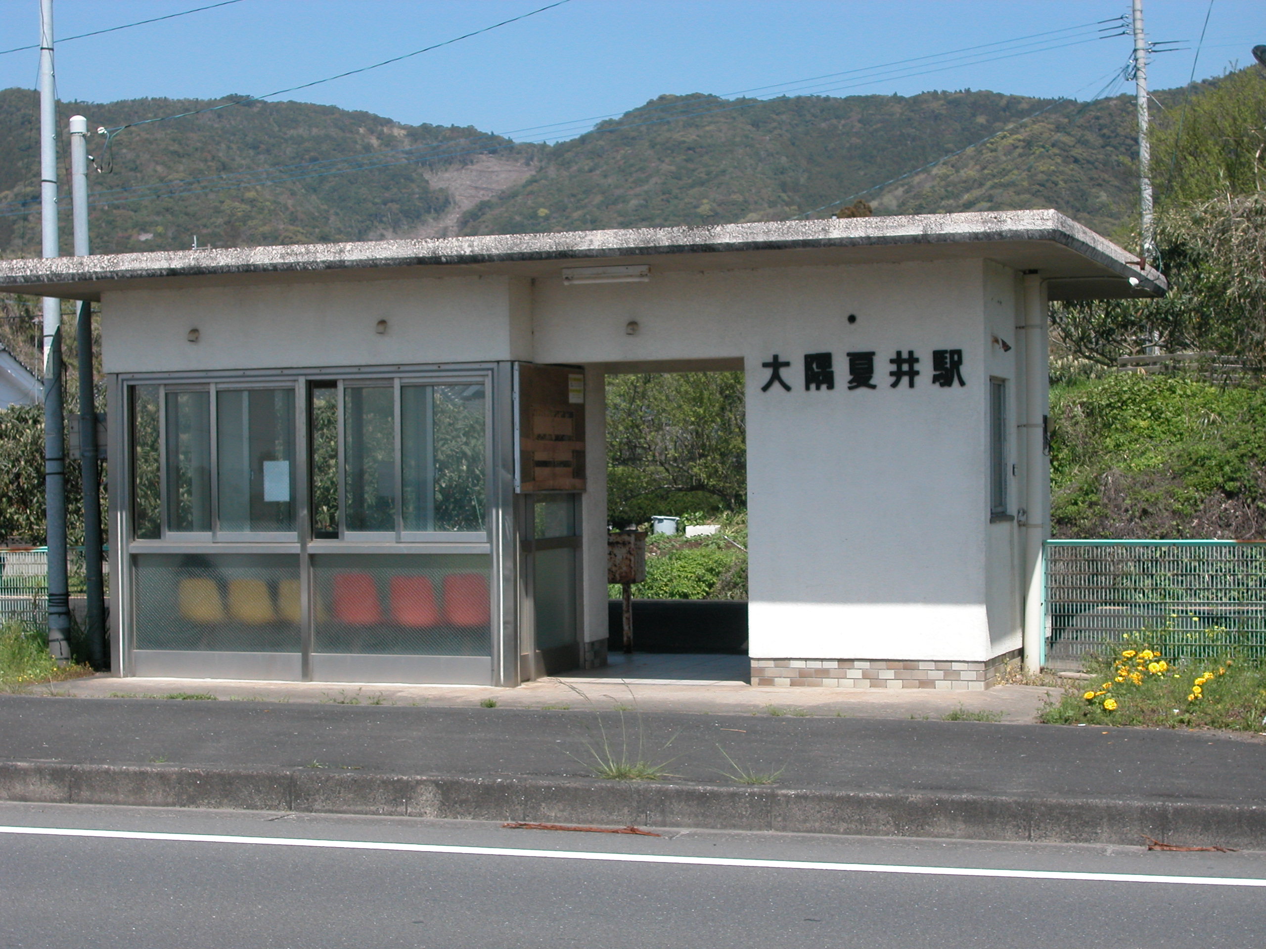 大隅夏井駅の駅舎